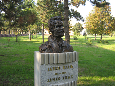 Bista J.Kralja u Kulpinu